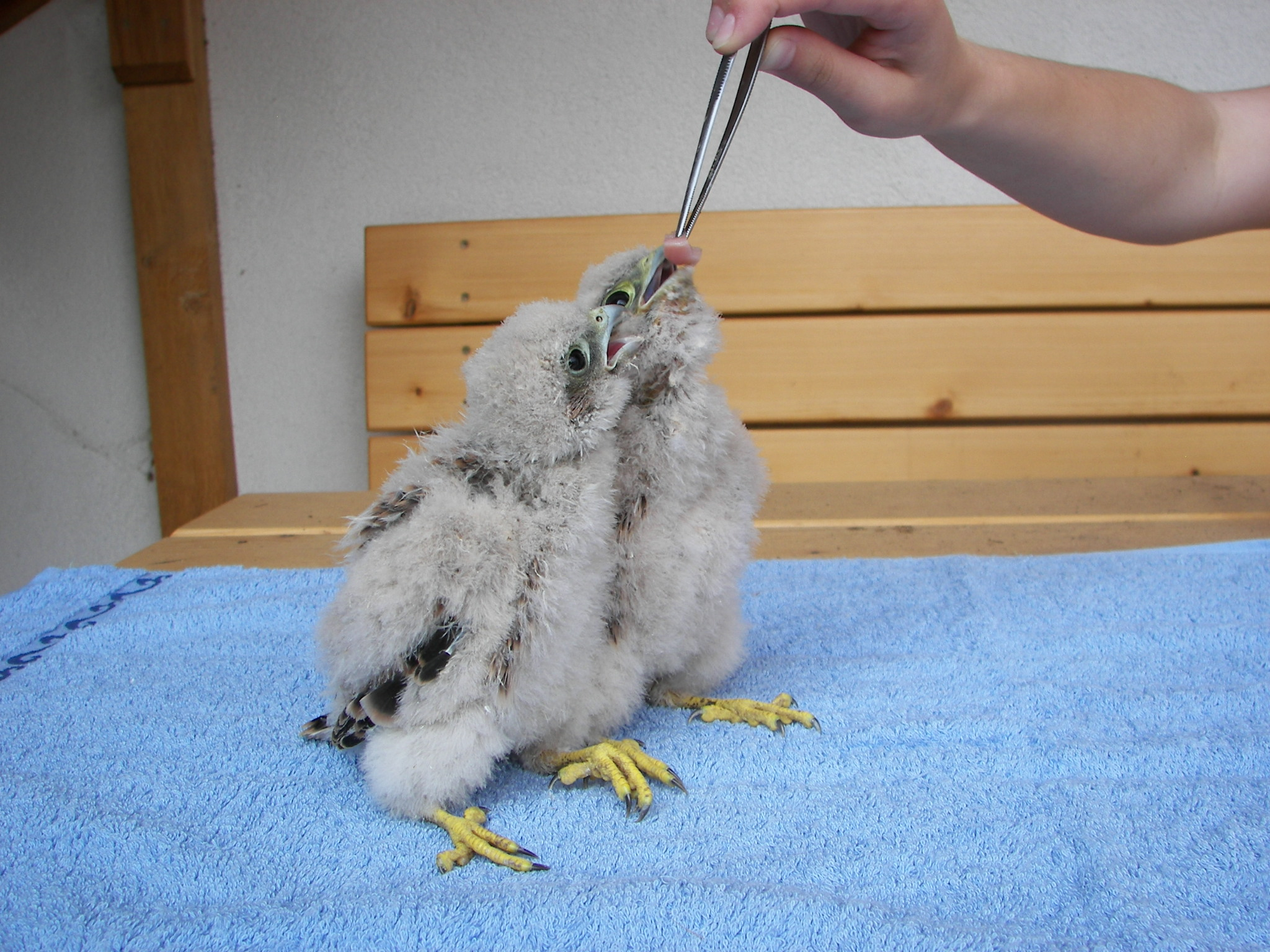 Dokrmování mláďat poštolek obecných v Záchranné stanici ve Vlašimi.